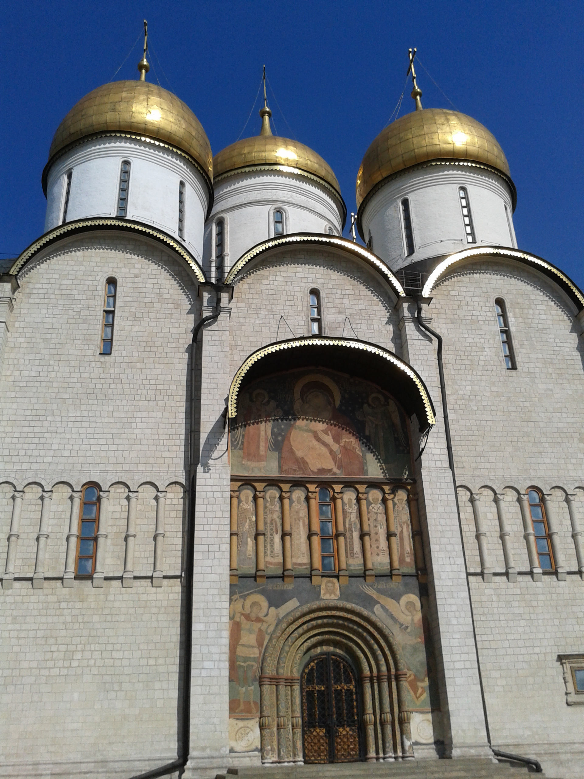 Московский Кремль. Успенский собор